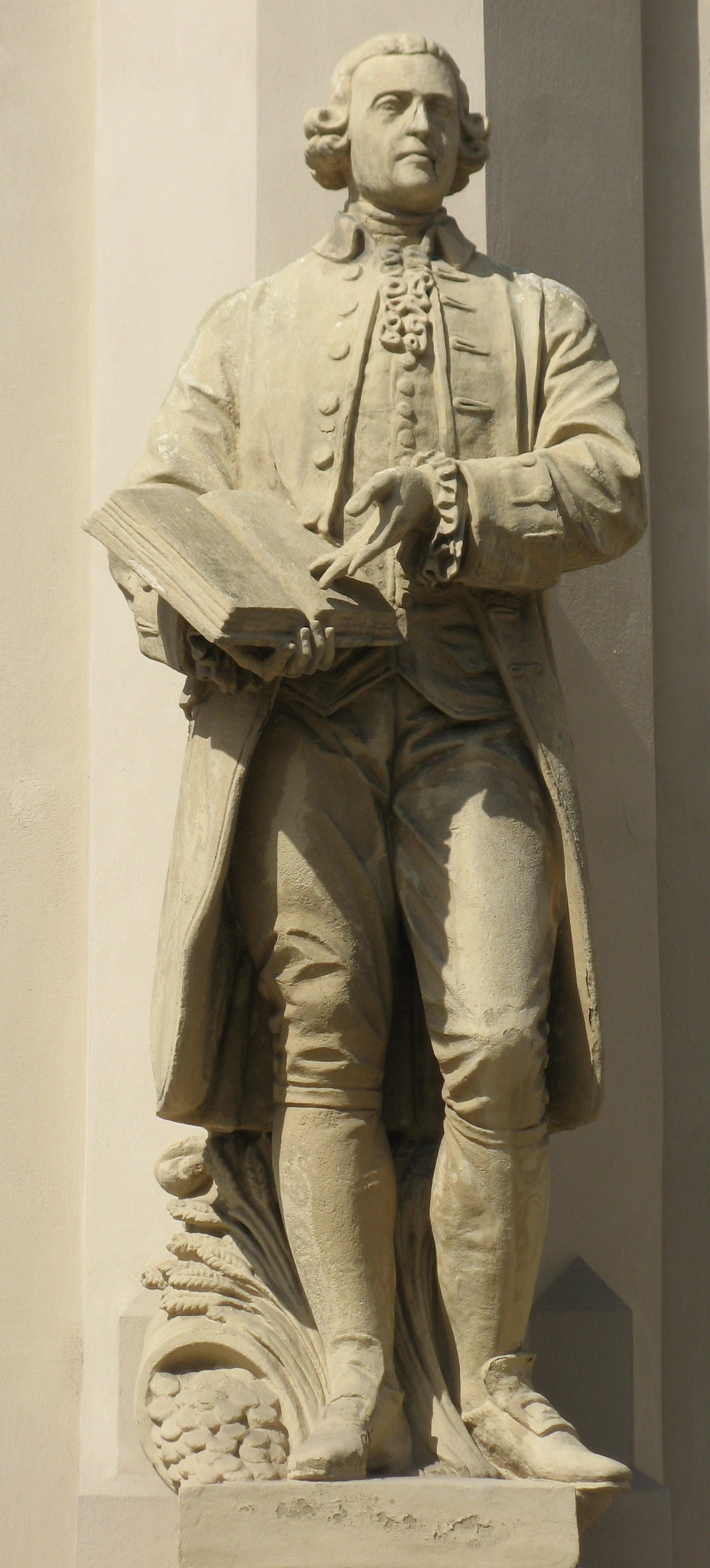 Adam Smith (1862) von Josef Cesar, Handelsakademie I, Akademiestraße 12, Wien-Innere Stadt